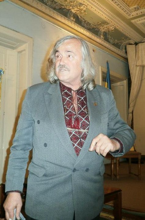 Олексій Заворотній на презентації Ірини Баковецької в НСПУ, 13 листопада 2014